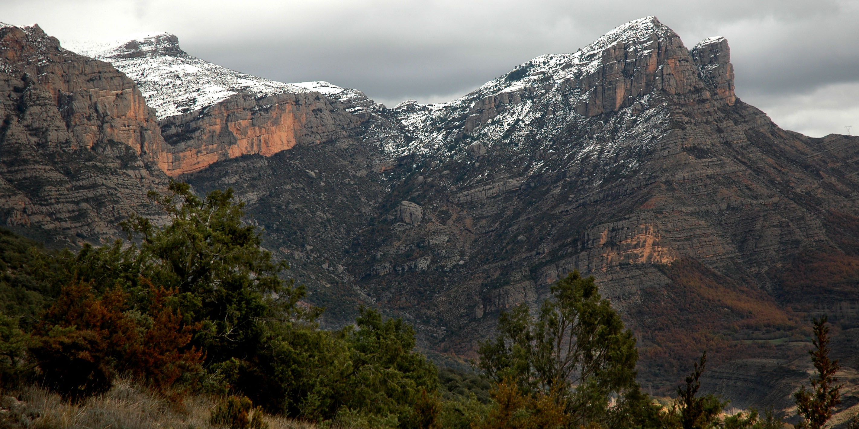 Projecte de col·laboració de l'Arxiu Ismael Latorre Mendoza amb Wikimedia Commons i Amical Wikimedia. Serra de Sis ( o també Serra del Cis) a la Ribagorça aragonesa-Prepirineus. Foto feta des del camí del Pedregal -de Rin de la Carrasca a la Pobla de Roda-. En la imatge podem veure: el Tossal dels Moros, el Brocoló, Carraduno i la Roca Cirera. Municipi: Isàvena.